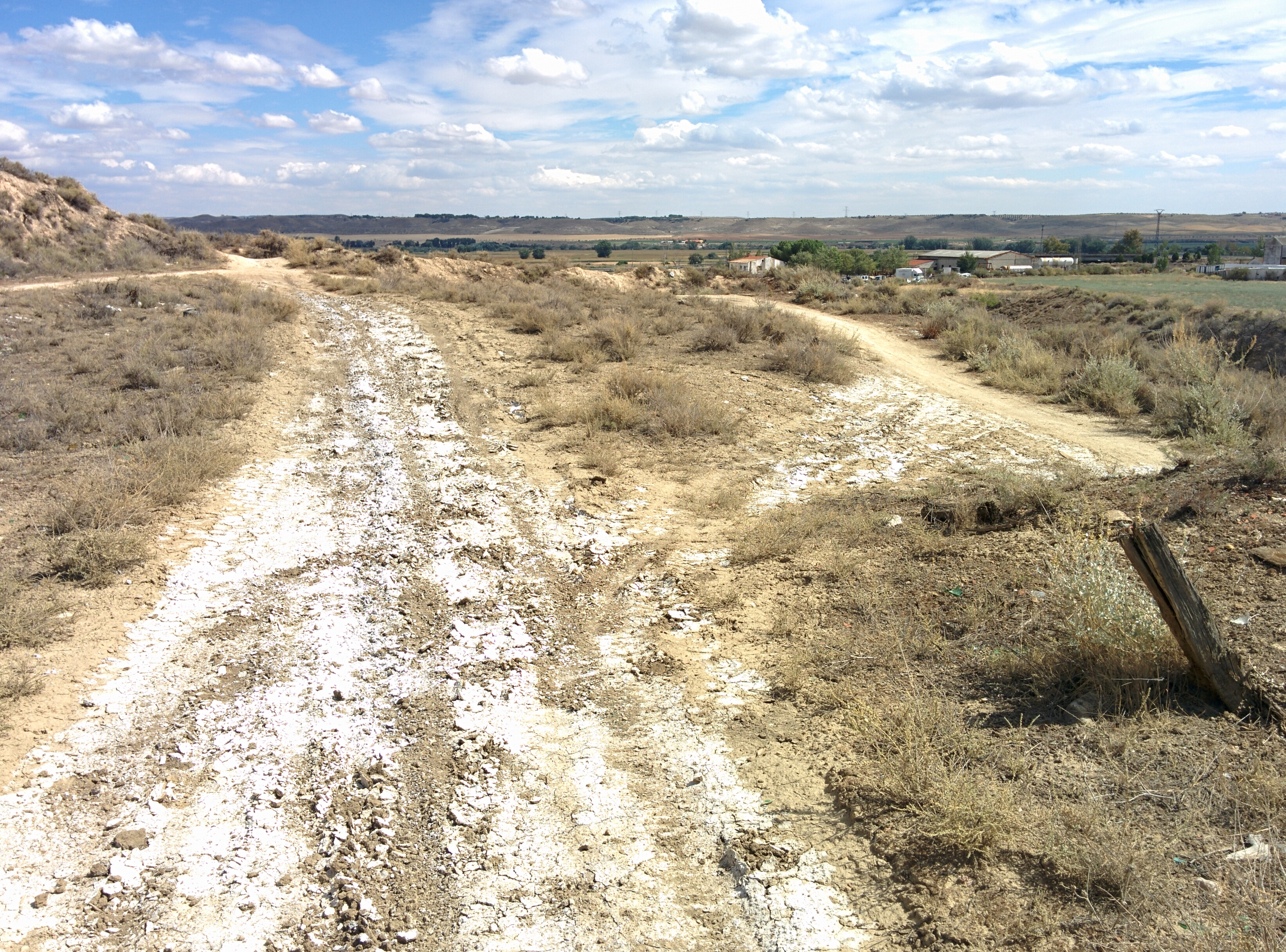 Salinas Espartinas, en Ciempozuelos (Madrid, España).